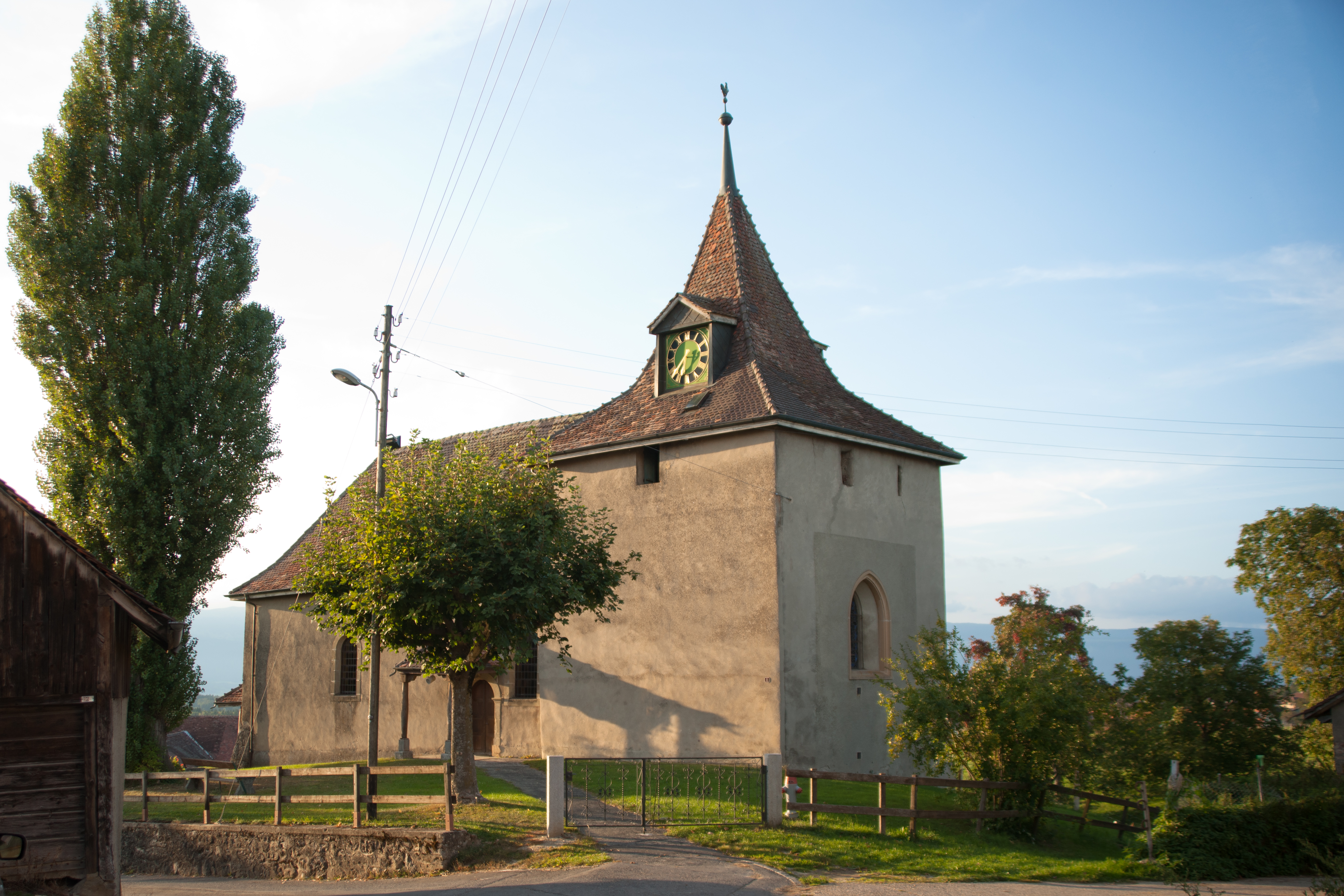 Église de Vuarrens, canton de Vaud, Suisse.